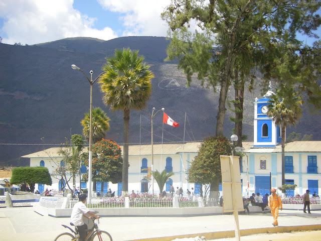 Hauptplatz der Provinzhauptstadt Celendín im August 2011